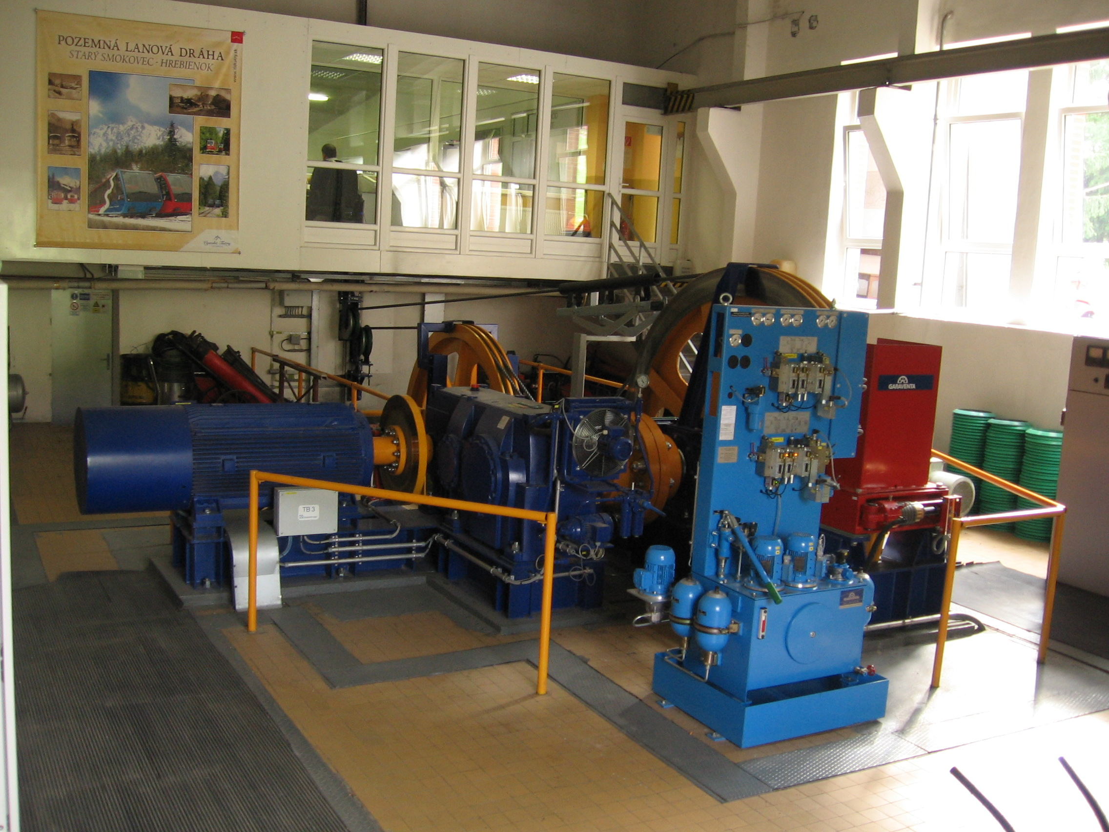 Hrebienok - strojovna lanové dráhy